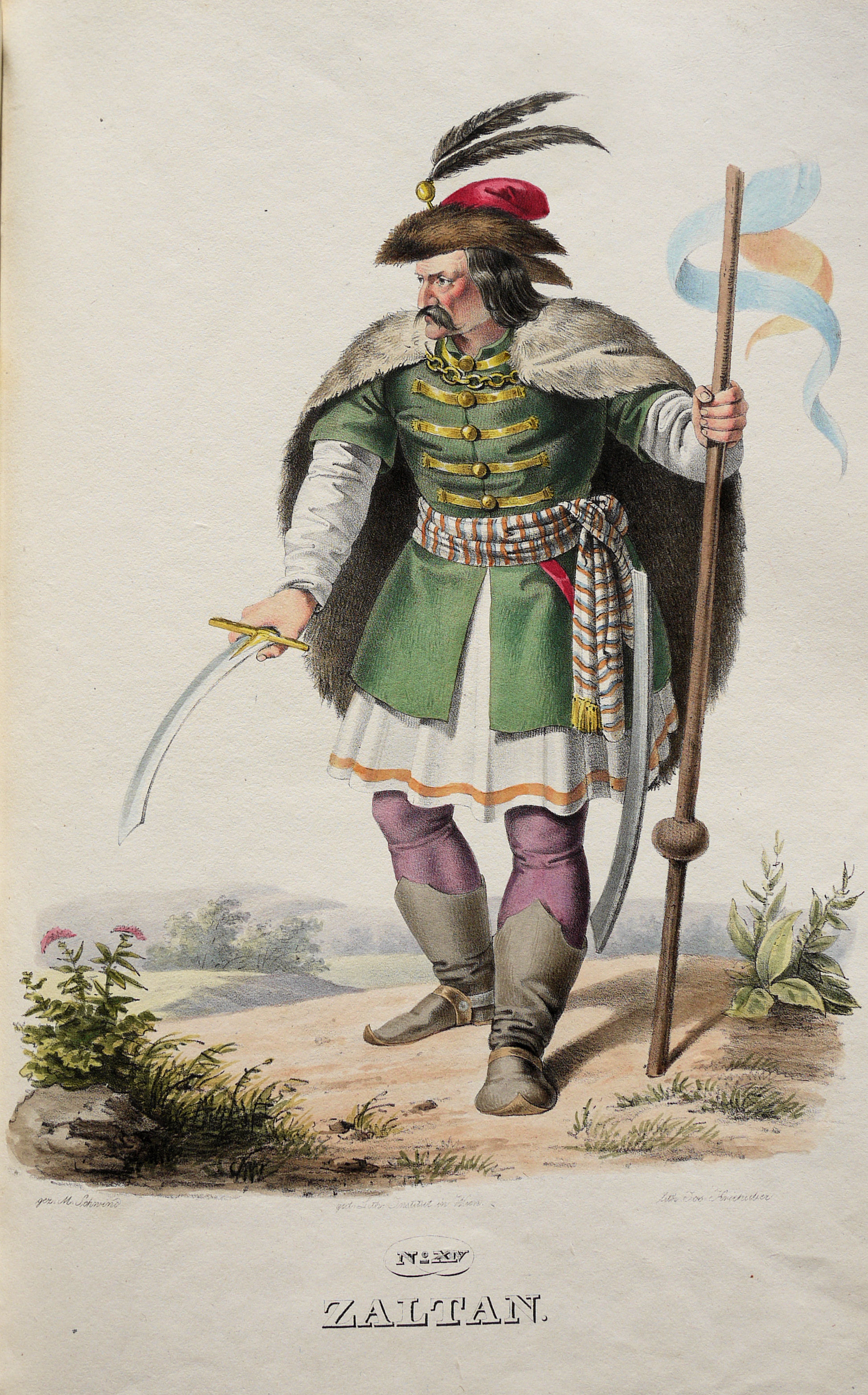 Zoltán (ca. 896-850), Großfürst von Ungarn. Lithographie von Josef Kriehuber nach einer Zeichnung von Moritz von Schwind aus Ungerns Erste Heerführer Herzoge und Koenige In einer Reihe von Bildnissen von Bela bis auf Seine Majestät Franz I. Kaiser Von Österreich König Von Ungern &c., &c. Wien : Lithographisches Institut ;ca. 1828